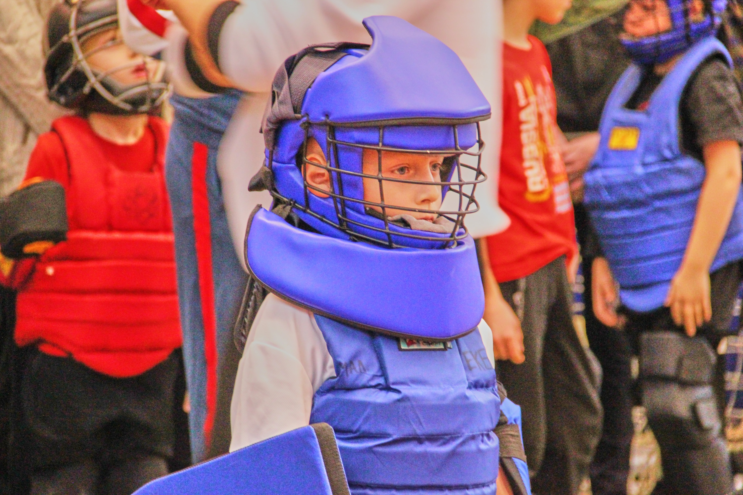 боец смб